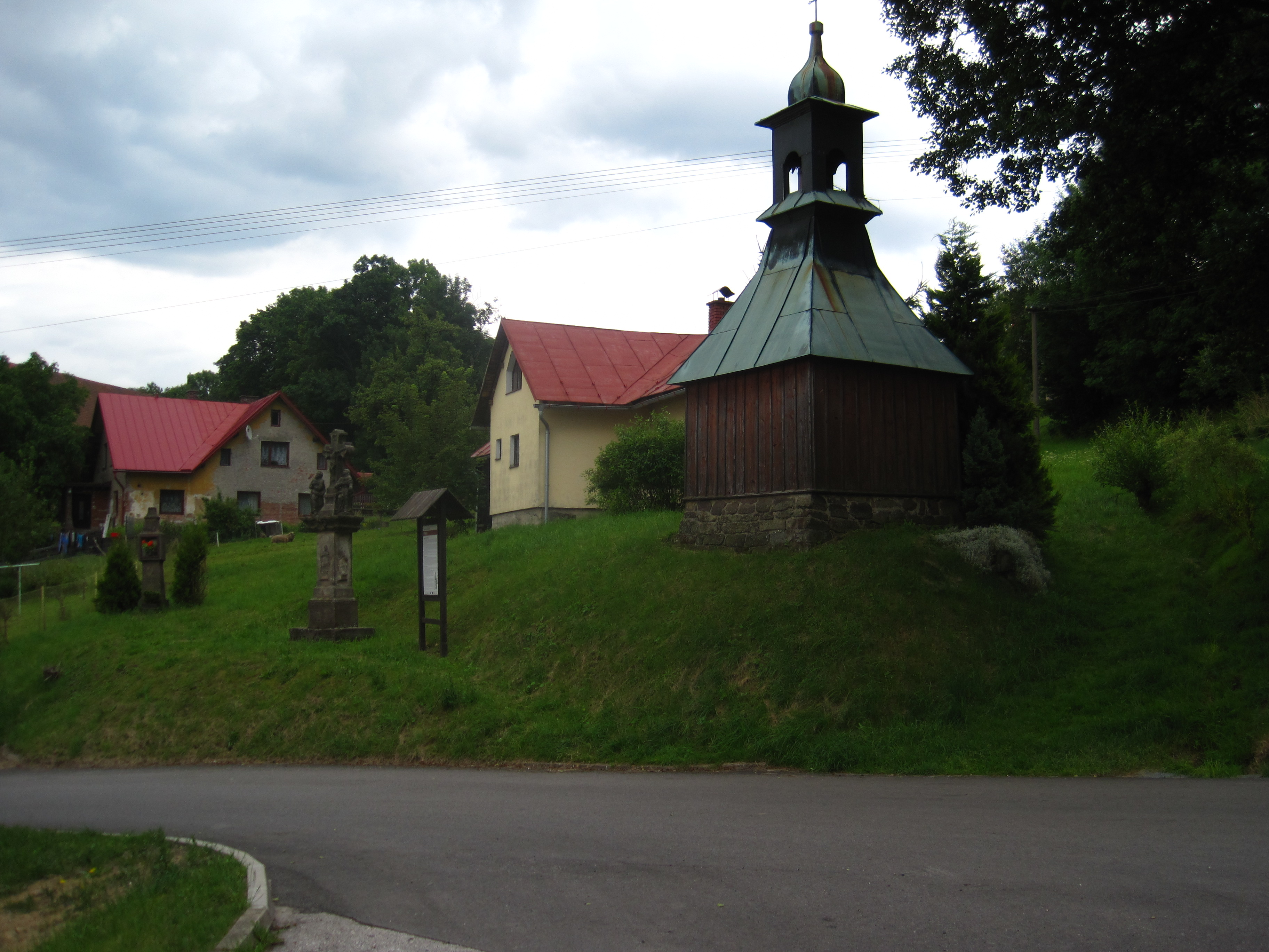 Příkrý - náves s kapličkou, kalvárií a božími muky